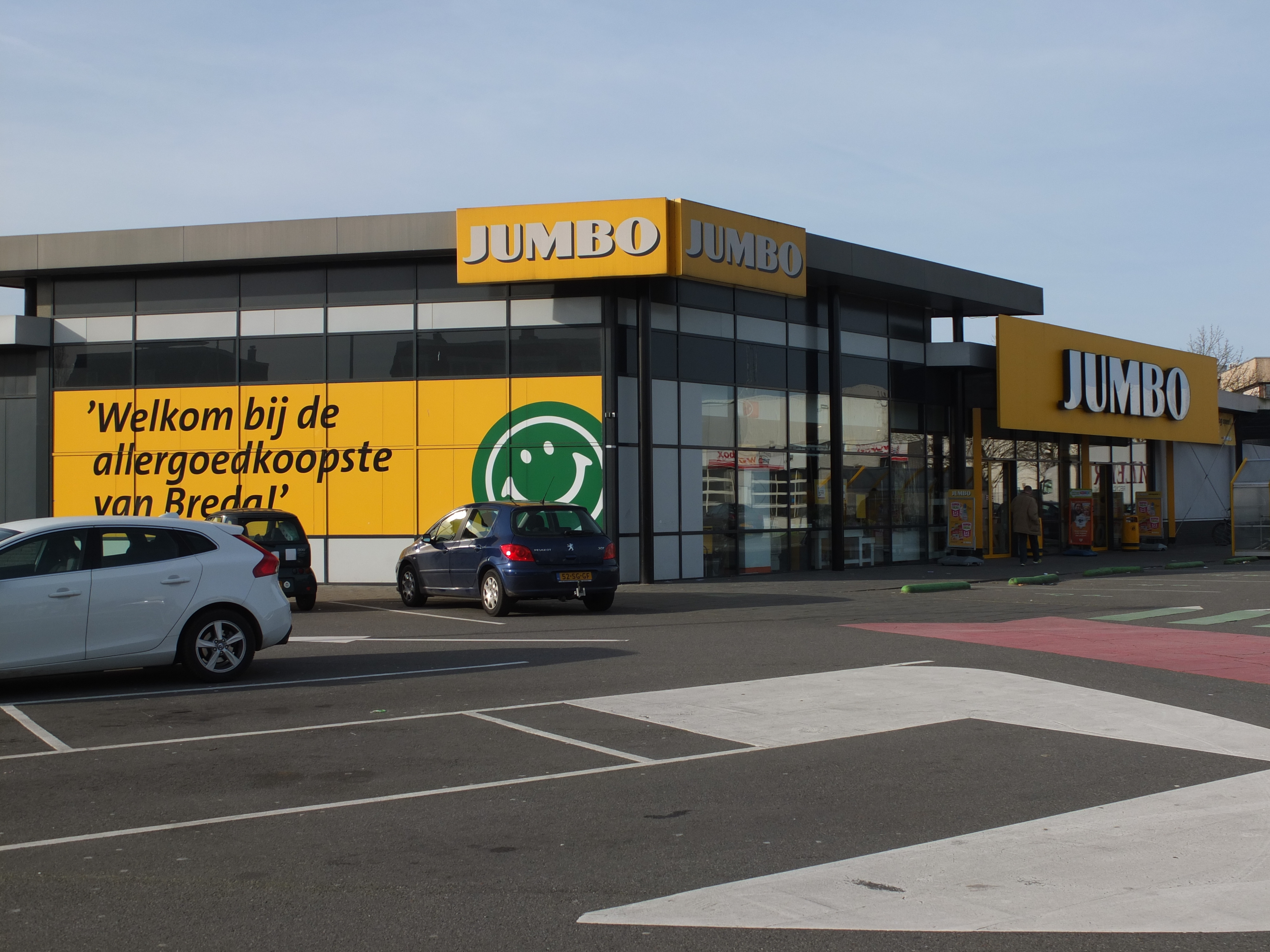 Zicht op een deel van de supermarkt Jumbo Belcrum, Belcrumweg 7, 4815 HA Breda. Gelegen in de wijk de Belcrum in het noorden van Breda